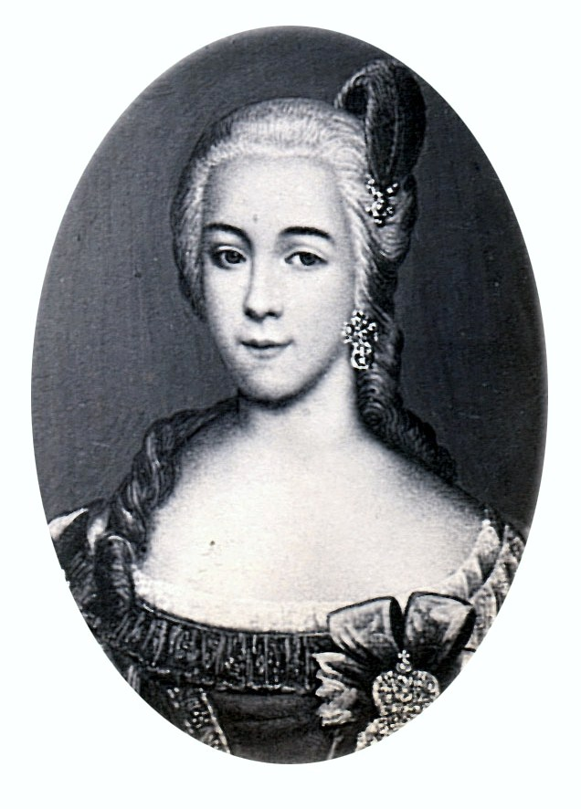 Графиня Марфа Симоновна Гендрикова (1724-1757)